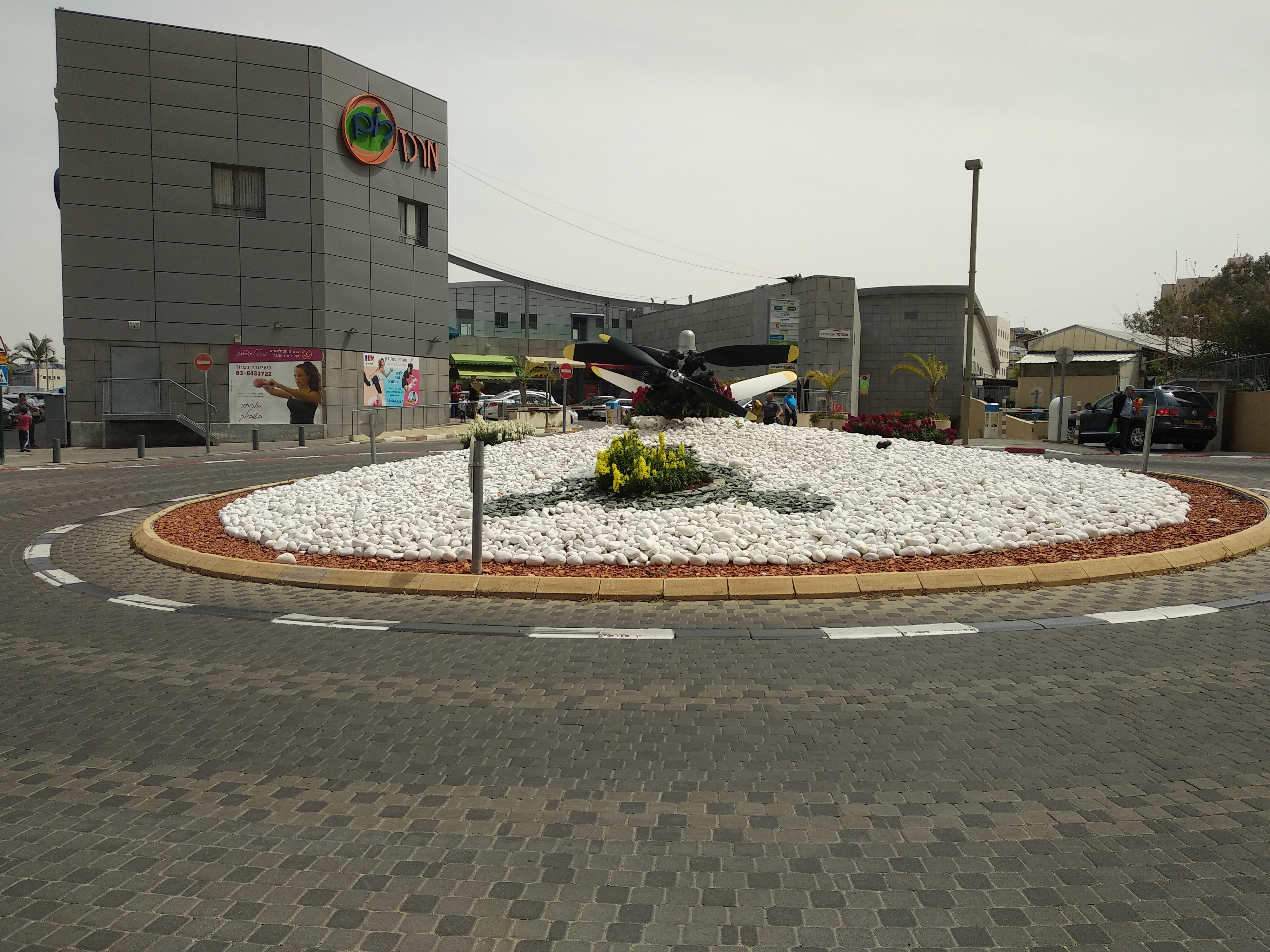 כיכר בשכונת אם המושבות, פתח תקווה